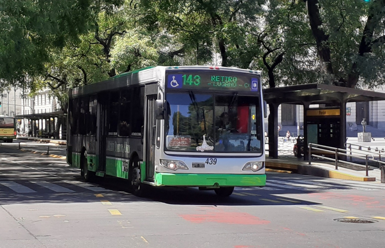 Colectivo de la línea 143